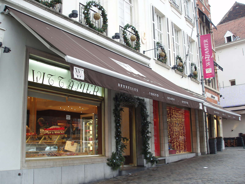 ＷＩＴＴＡＭＥＲ